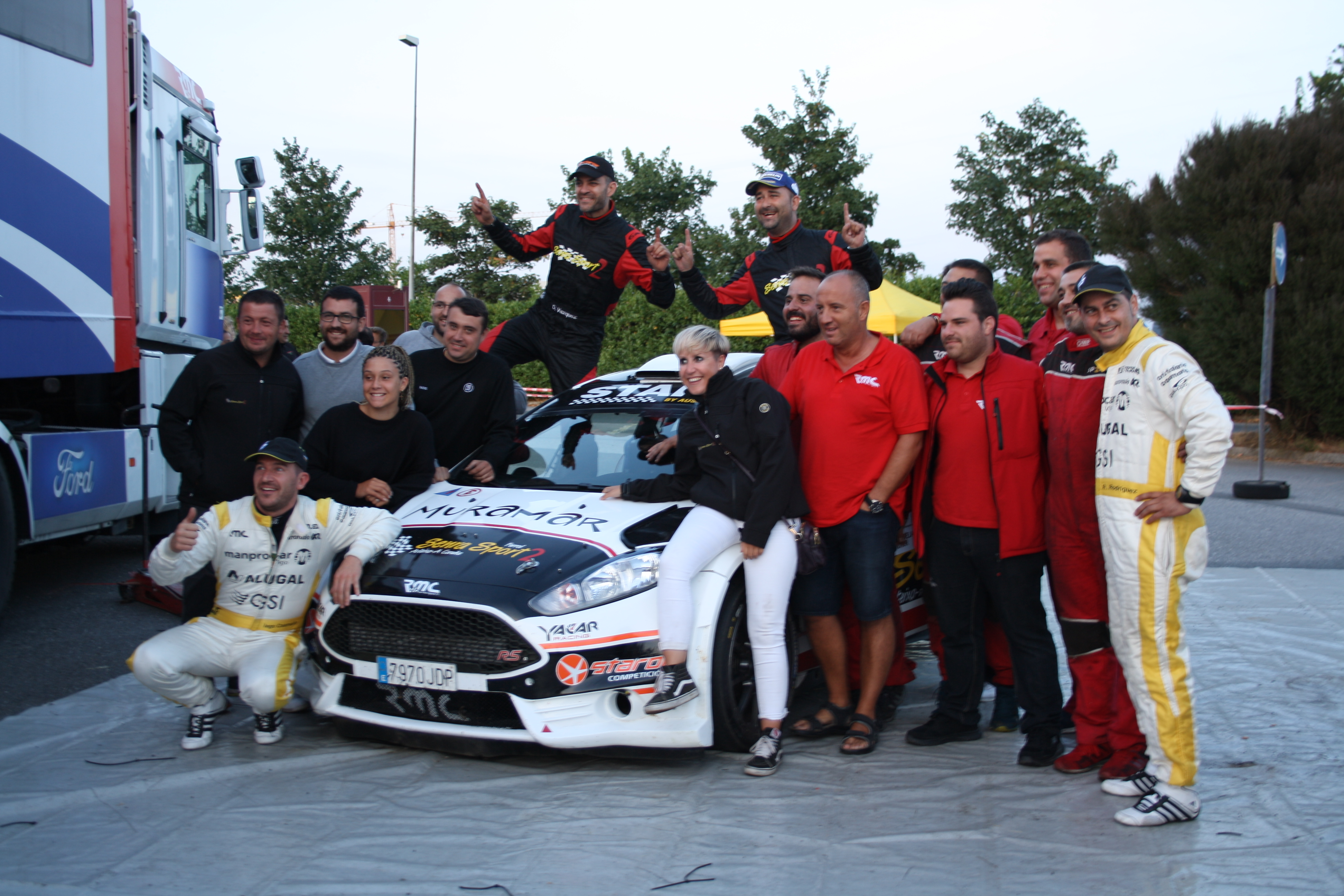 Rally Botafumeiro 2018. Parque final en el Recinto Feiral de Amio. Celebración de RMC con Víctor Senra, Iago Caamaño y el resto del equipo.